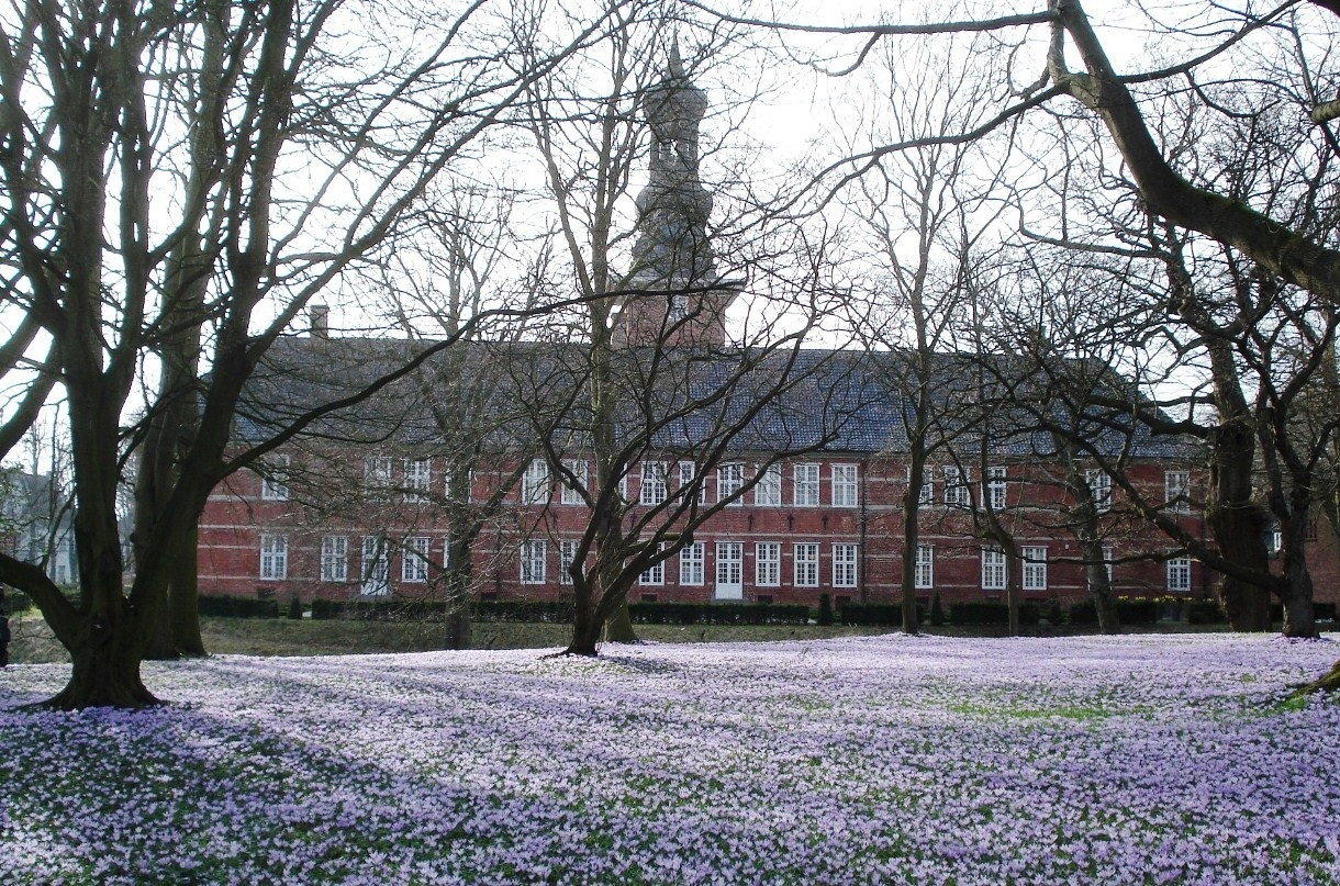 Husumer Krokusblüte - Schloss vorHusum